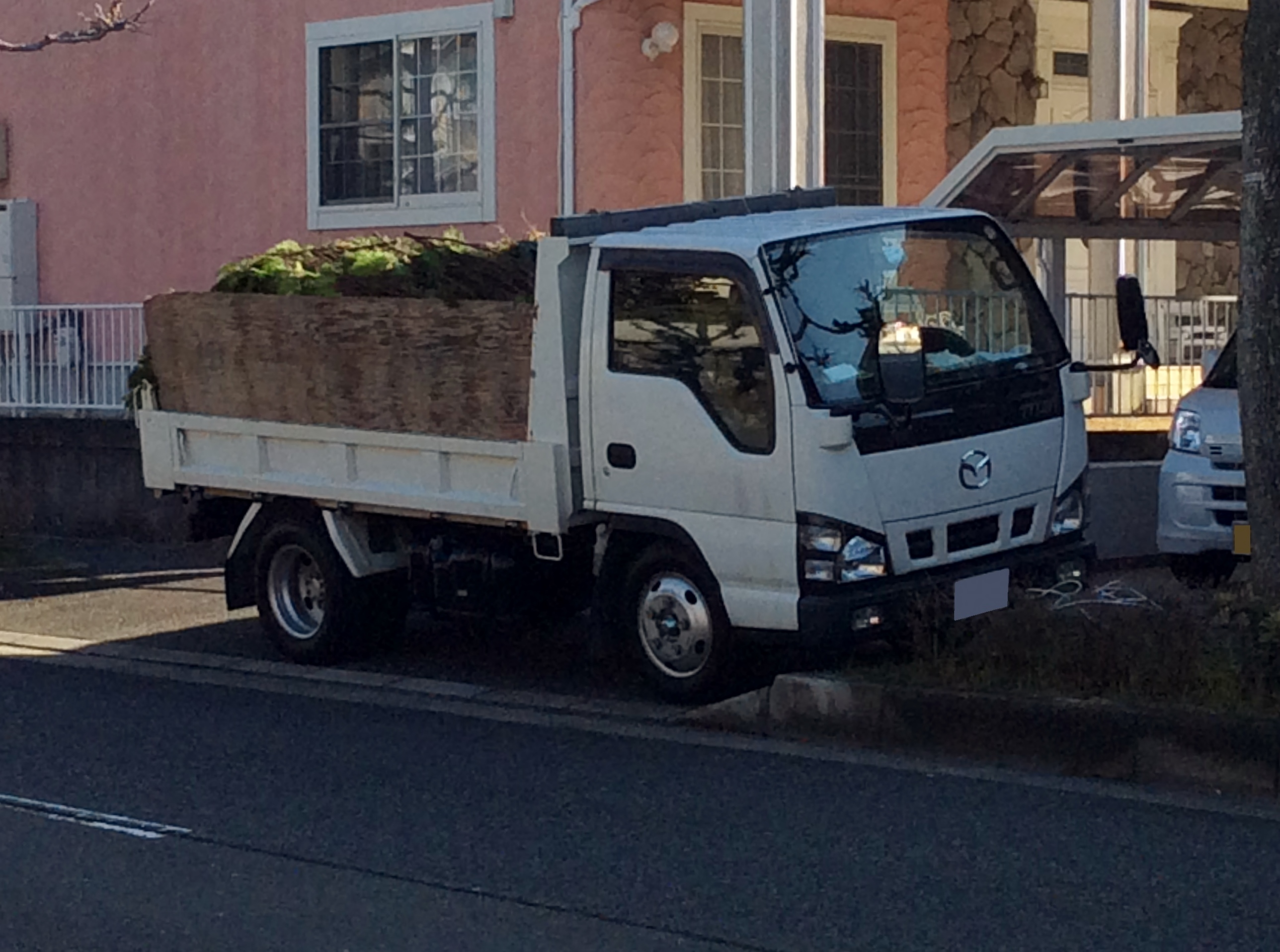 5代目マツダ・タイタントラックをフロントから撮影。